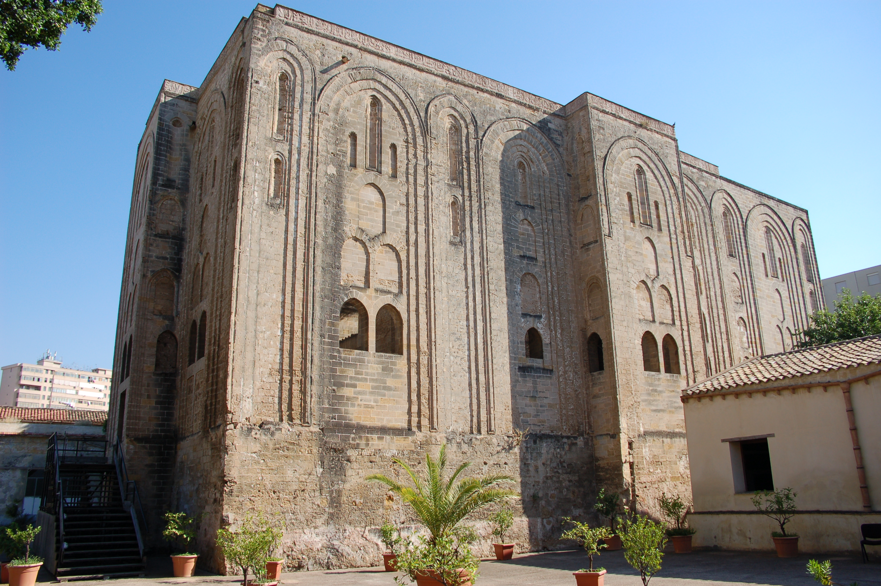 La Cuba (Palermo), Italy